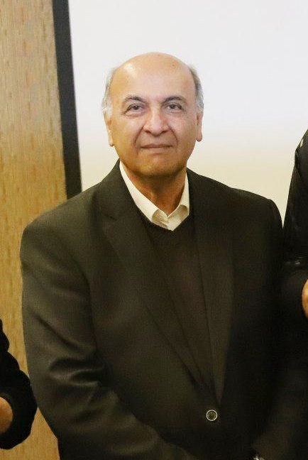 تصاویر مرحله دوم کلاس مربیگری B آسیا در تهران به مدرسی امیر حسین پیروانی با حضور ستارگان سابق فوتبال مثل تیموریان، جباری، حیدری،‌عمران‌زاده، بیک‌زاده و بنگر